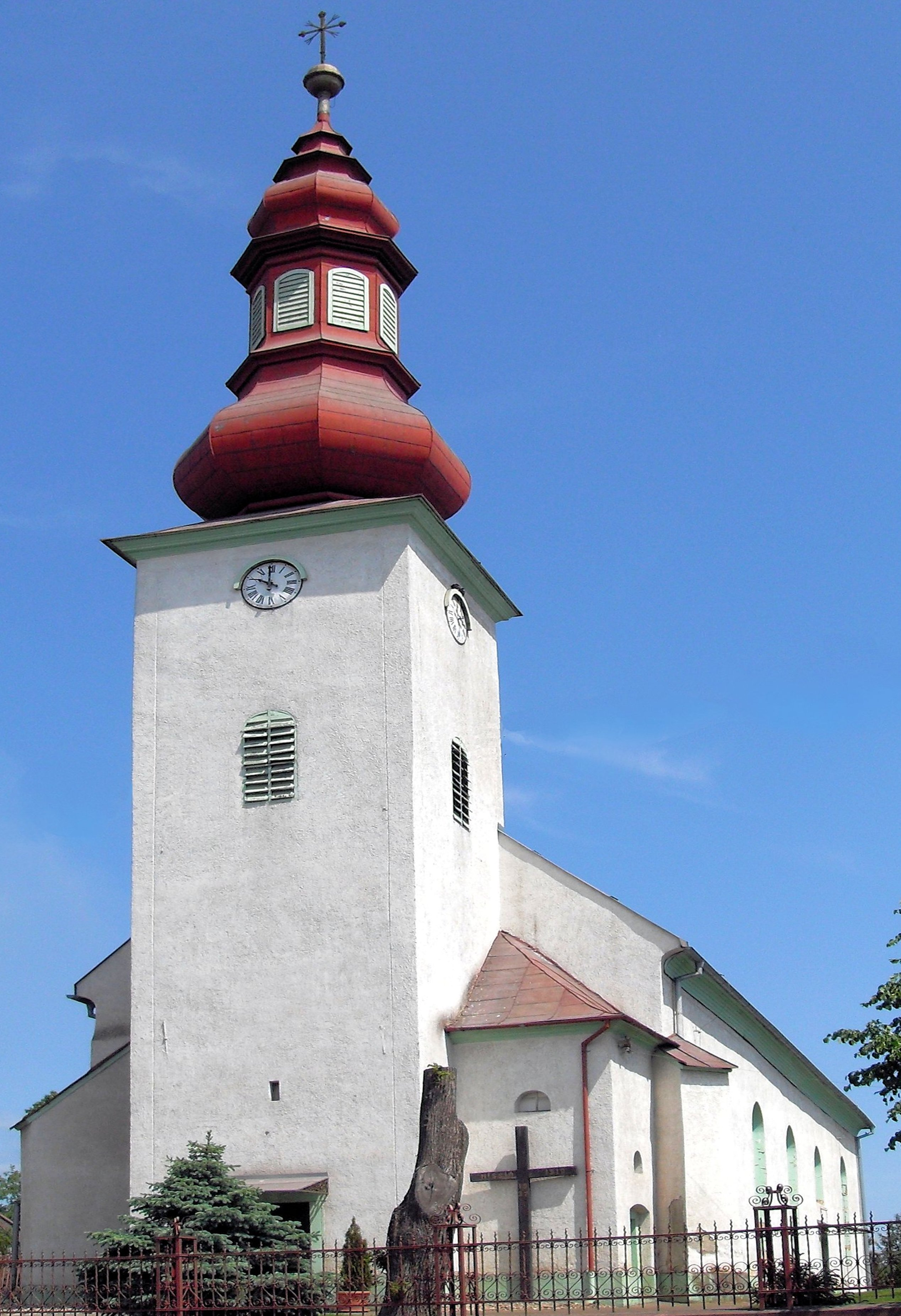 Rímskokatolícky kostol Svätého Martina z Tours Veľká Ida